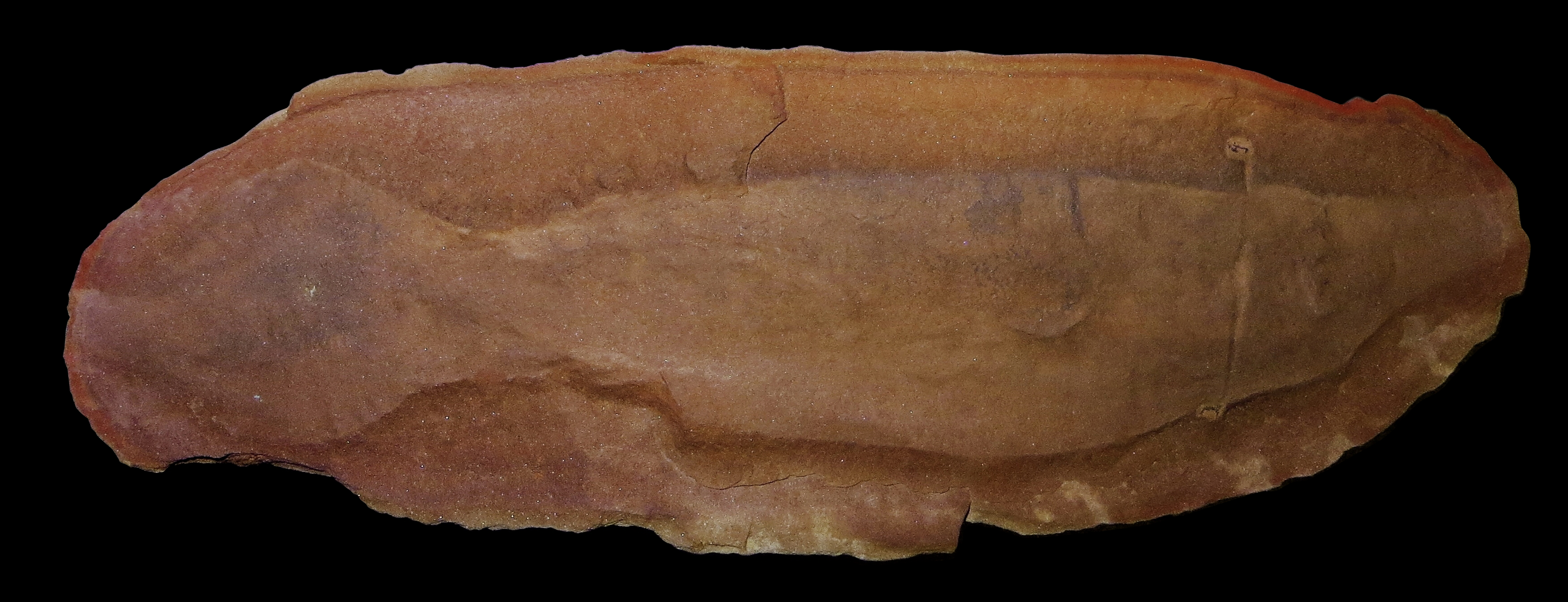 Fossil of Tullimonstrum- Took the picture at Museo di Storia Naturale di Milano